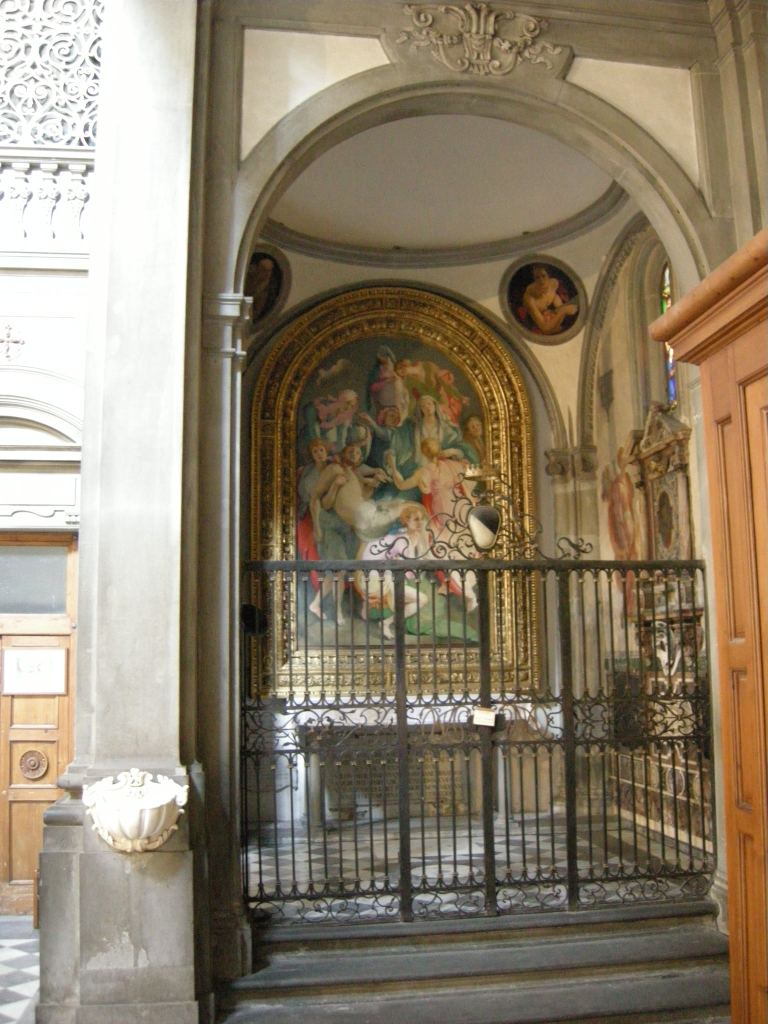 Cappella barbadori, architettura